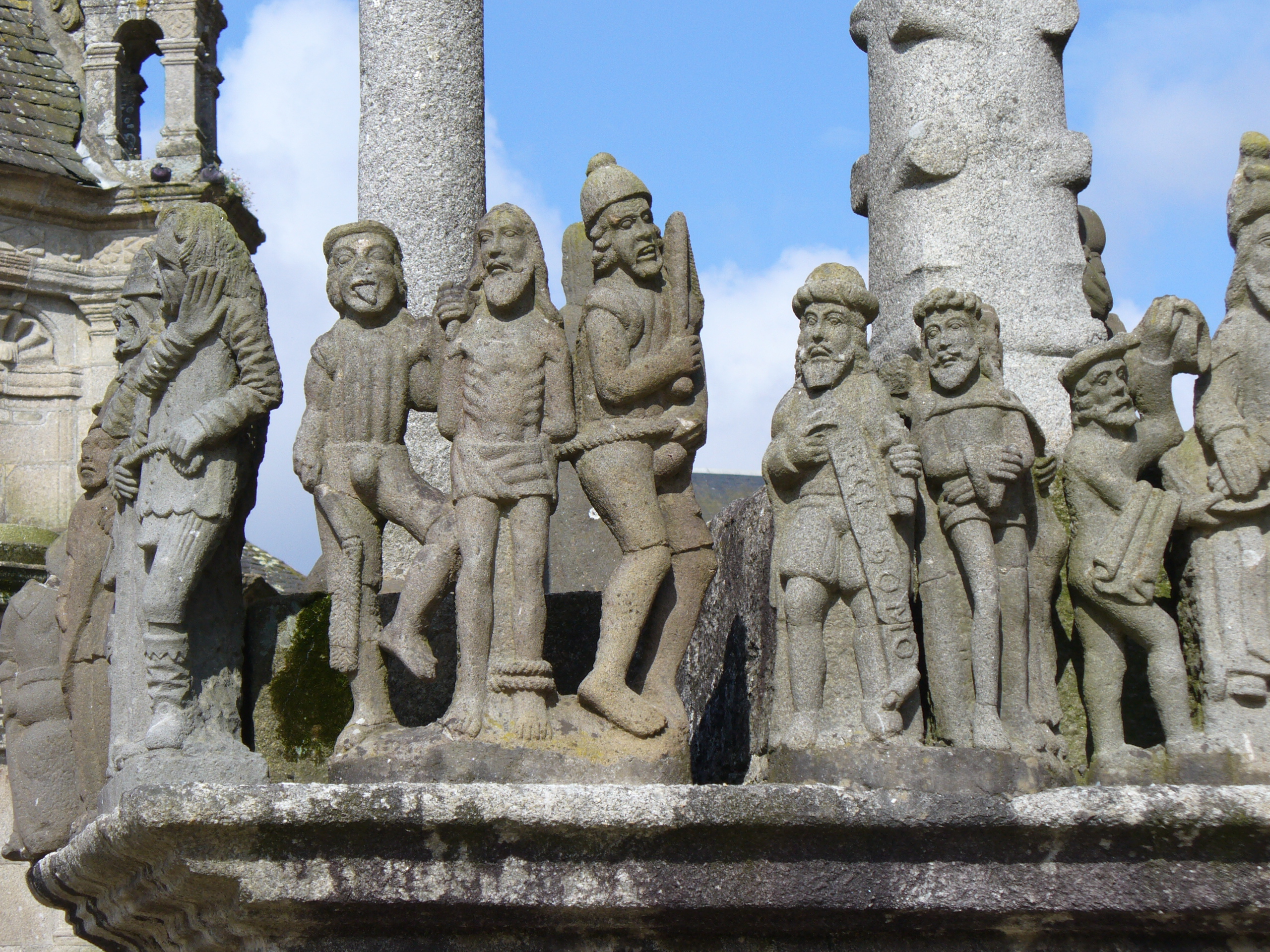 Kalvarienberg(calvaire-1610)-Saint Thegonnec-Steinfiguren lassen erkennen was sie fühlen,ob sie glücklich,leidend,böse sind oder etwas im Schilde führen.Biblische Szenen vermischt mit lokalgeschichtlichen Ereignissen